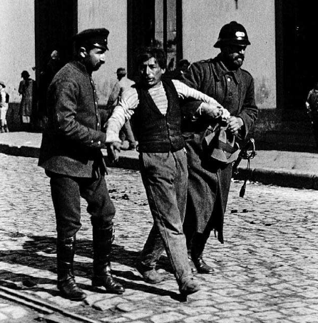 Borracho detenido en el Almendral, Valparaíso